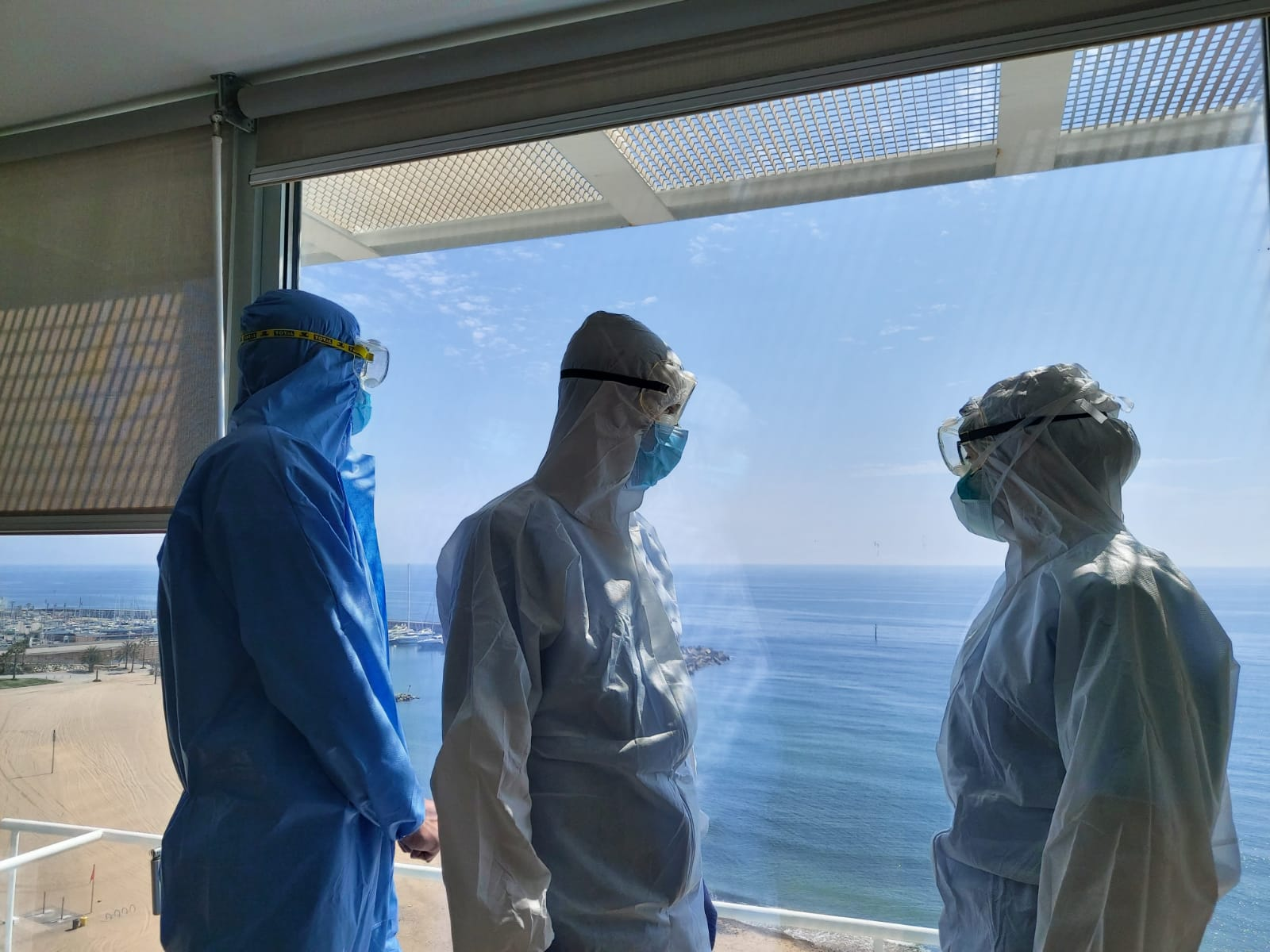 Personal sanitari a l'Hospital del Mar de Barcelona durant la crisi del Covid-19